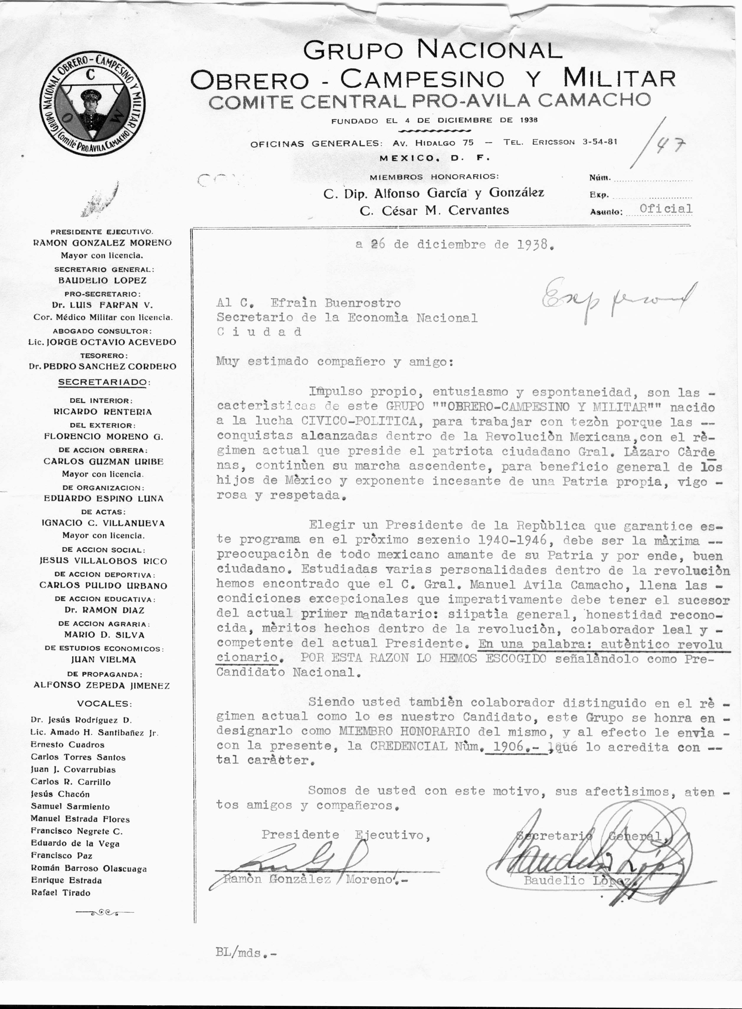 Nombramiento a Efrain Buenrostro como miembro honorario de apoyo a la candidatura Presidencial de Avila Camacho